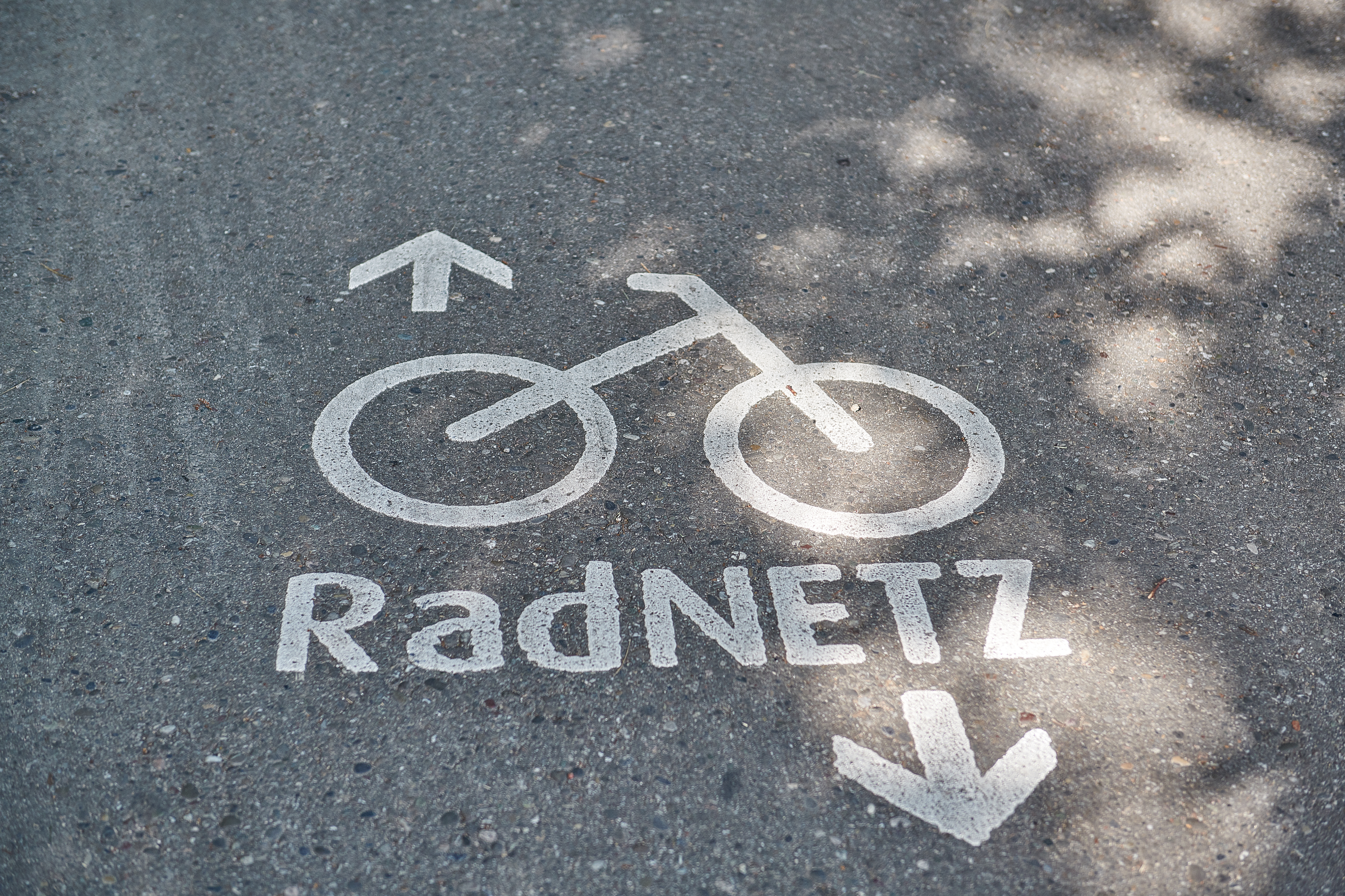 Lörrach: Wiesentalradweg, Hinweis "Radnetz"